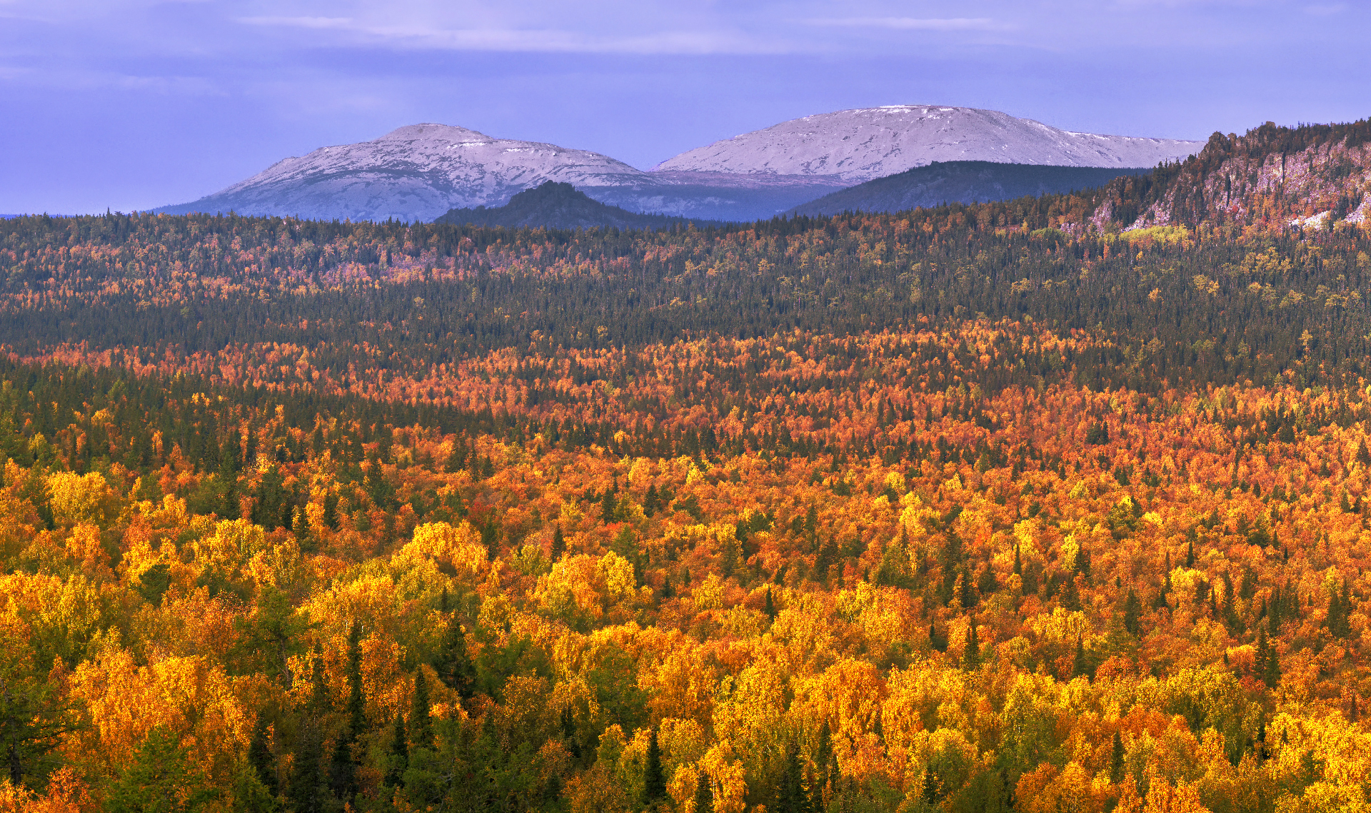 Осенний лес вокруг горы Ямантау